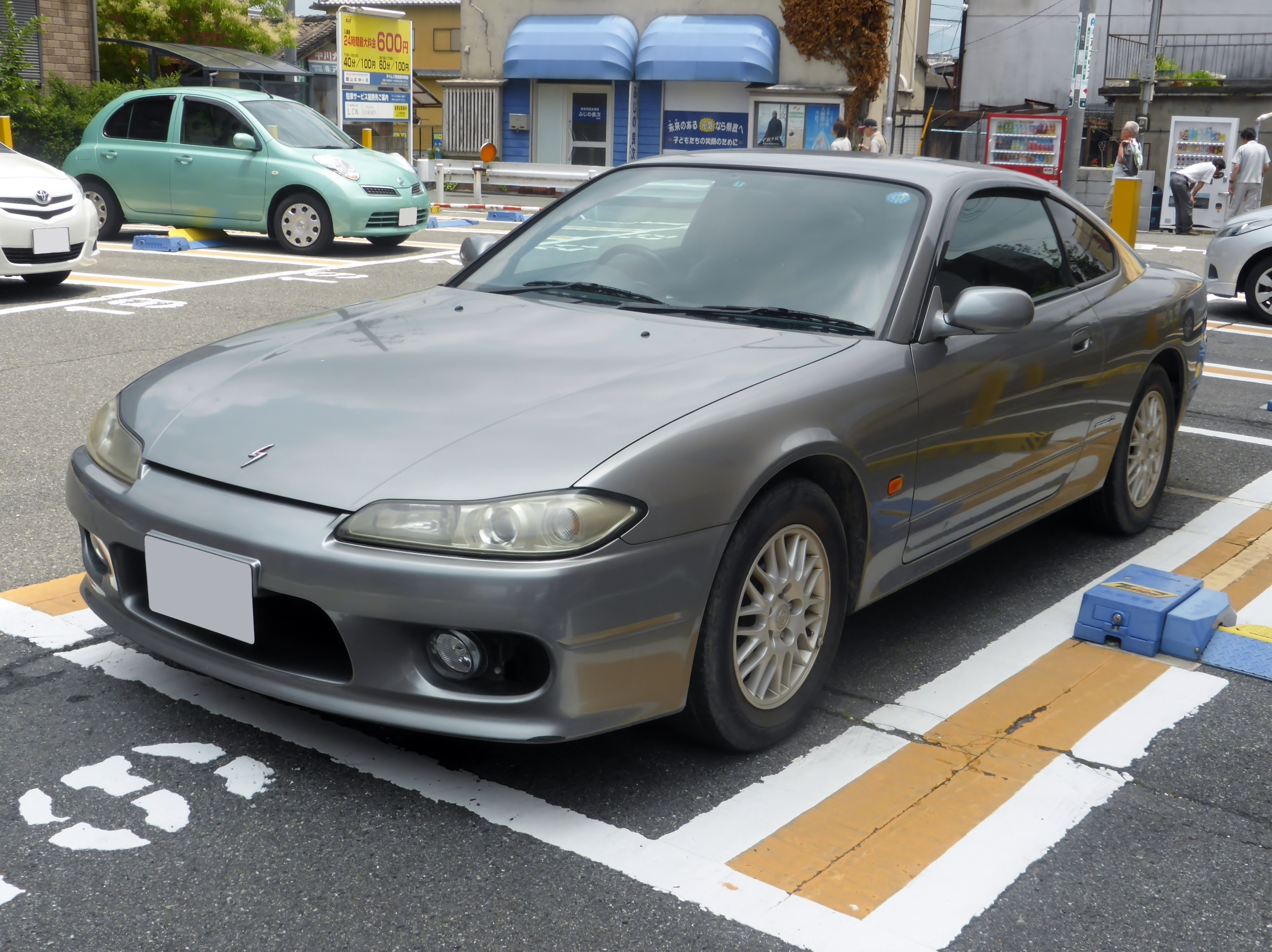 S15型日産・シルビアspec Sをフロントから撮影。